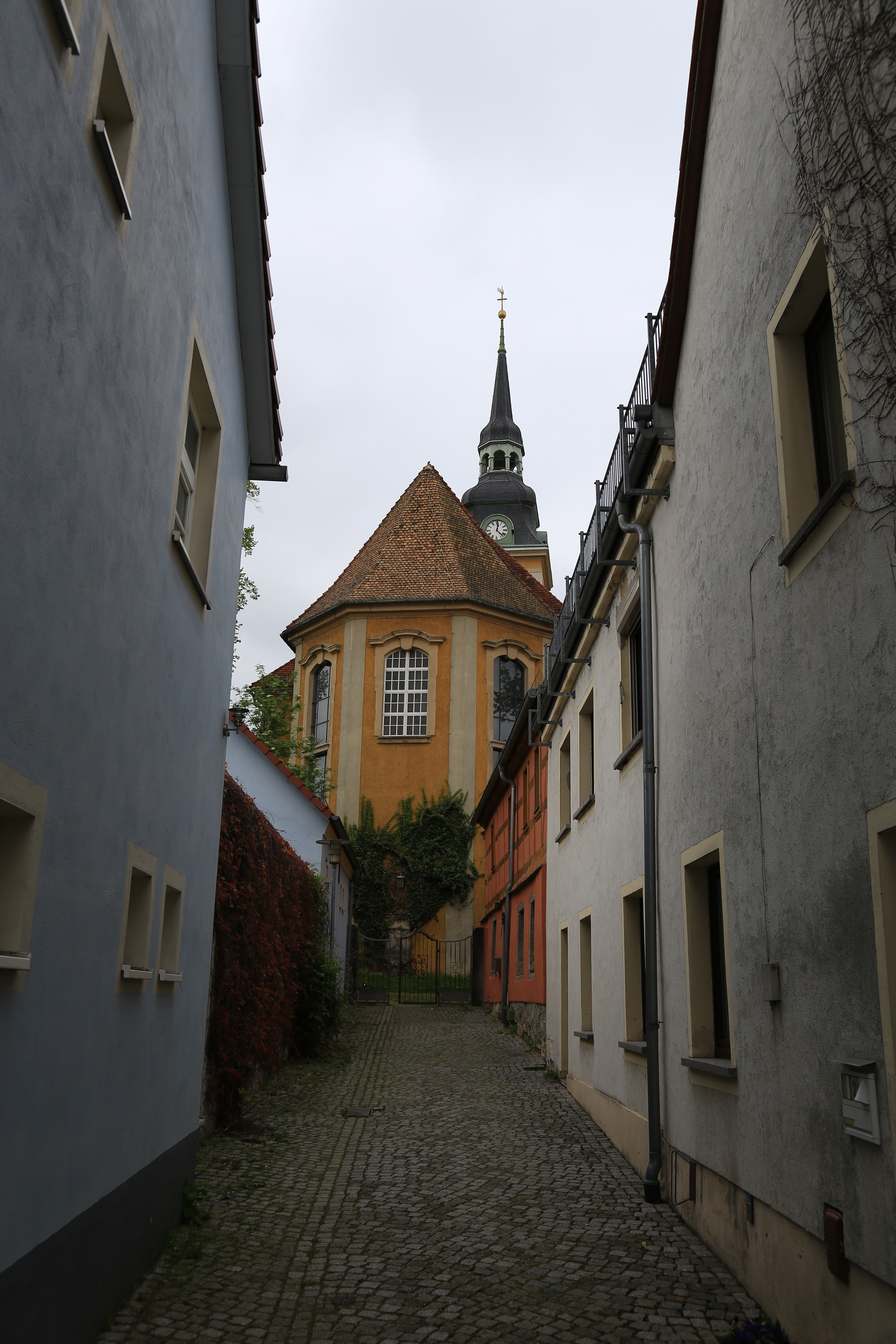 Kirche Elstra Mai 2017 (1)